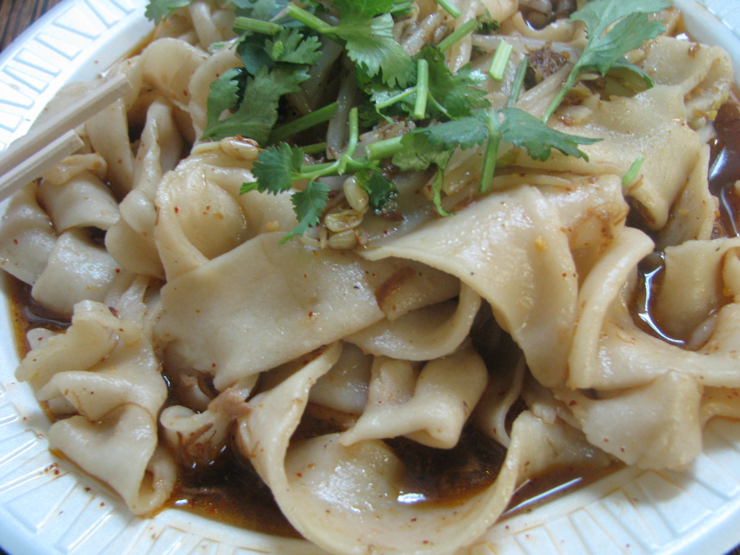 Biang Biang Mian closeup